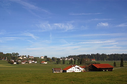 Le Bémont